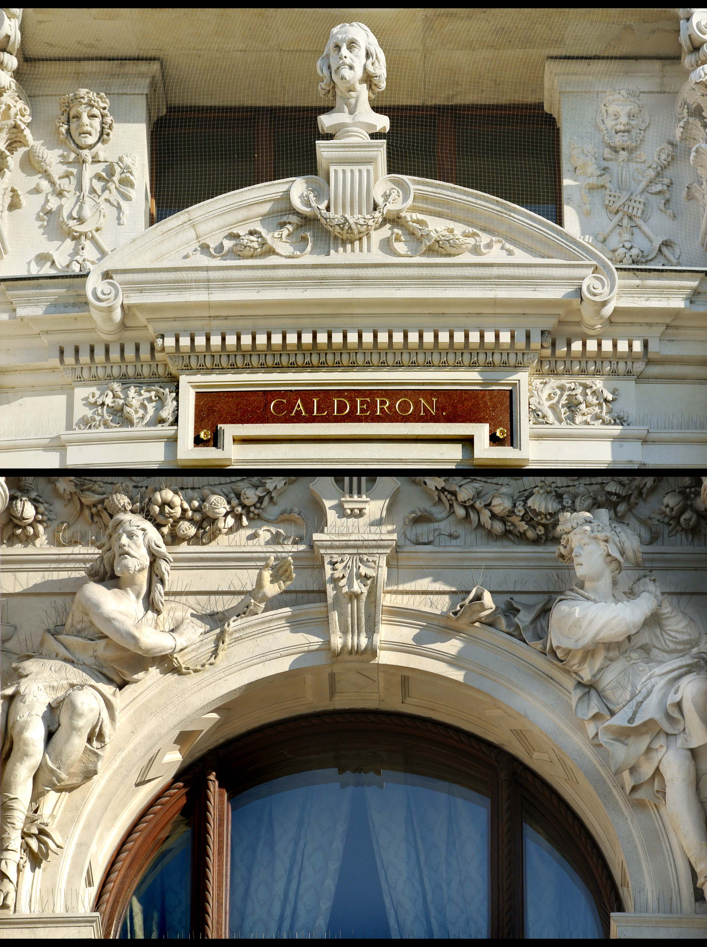 Viktor Tilgner (*25.10.1844 in Preßburg, † 16.4.1896 in Wien) Bildhauer,schuf die Kolossalbüste von Calderon de la Barca.